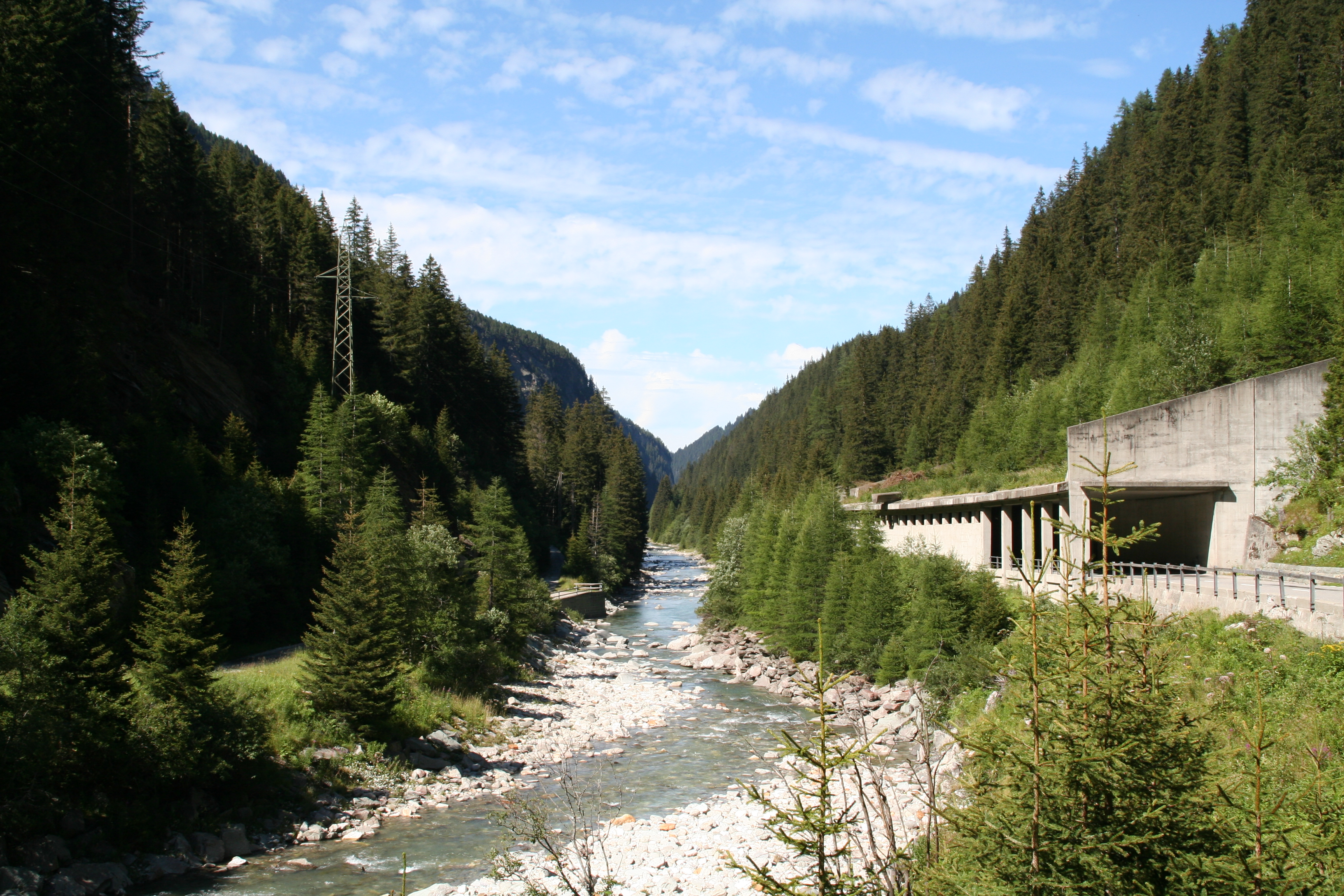 Blick vom Stausee nach Norden